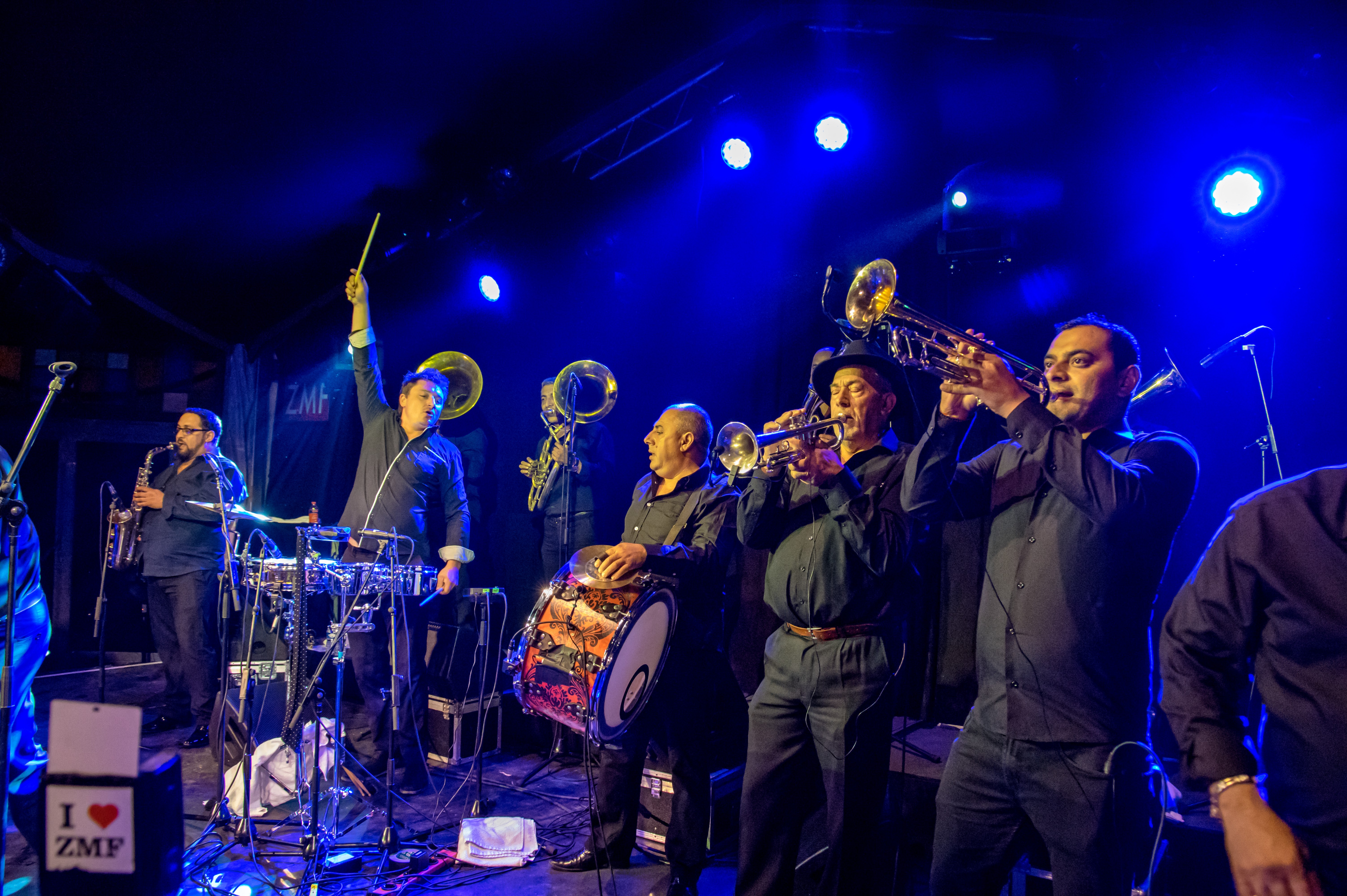 Bilder vom Zelt Musik Festival 2017 in Freiburg im Breisgau Fanfare Ciocarlia am 10.07.2017